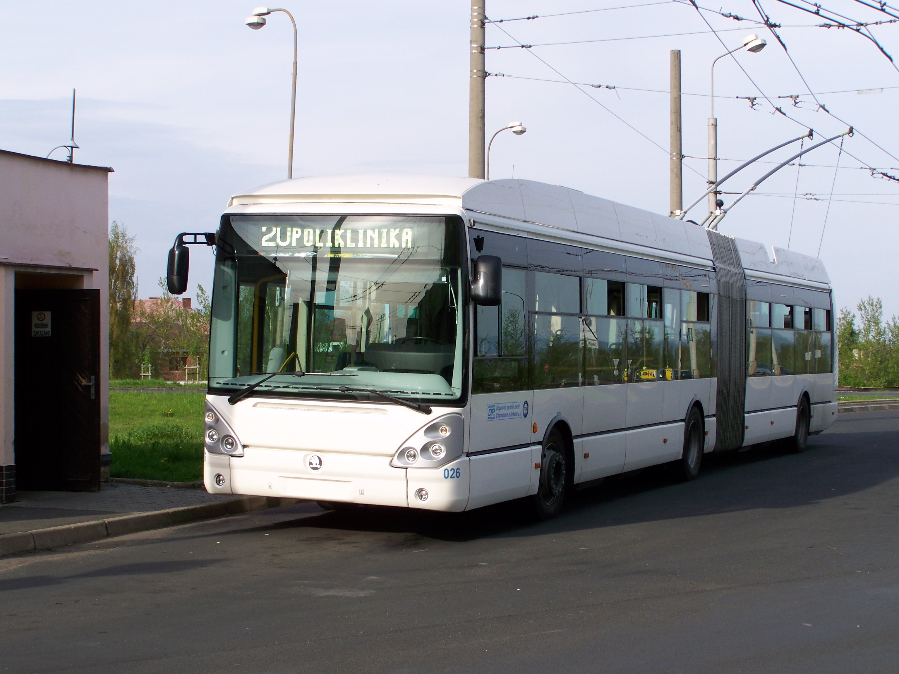 Fotografie Chomutovského nízkopodlažního trolejbusu Škoda 25TrBT ev. číslem 026.